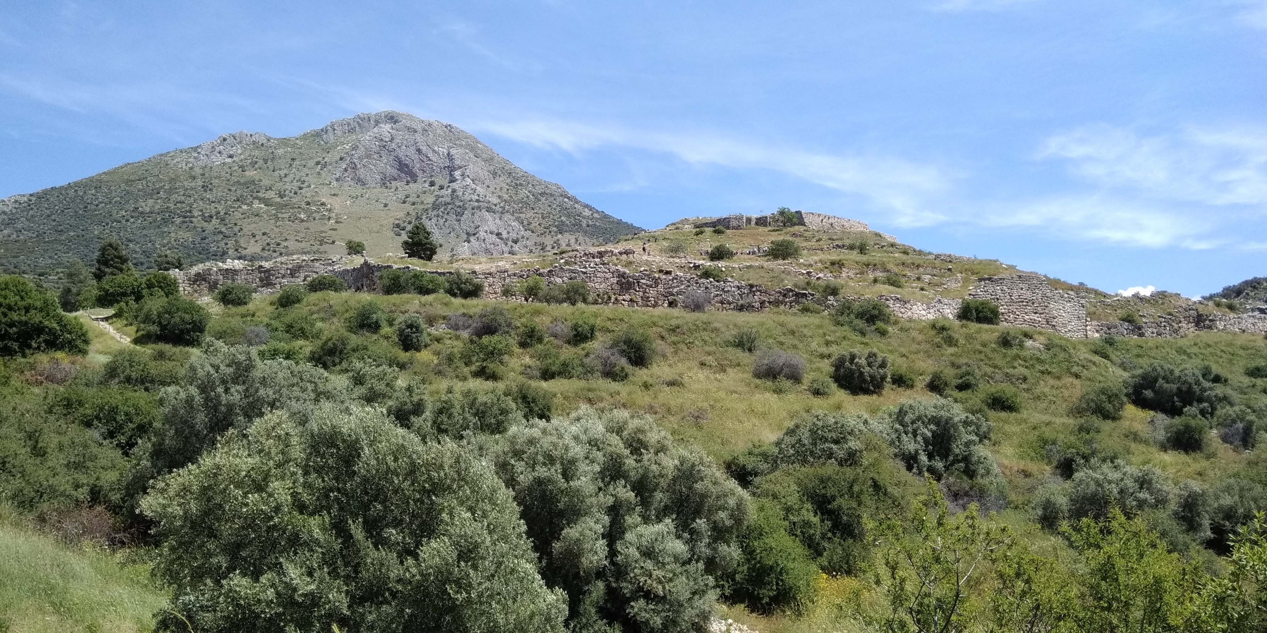 Vue de la Citadelle de Mycènes devant le mont Agios Ilias